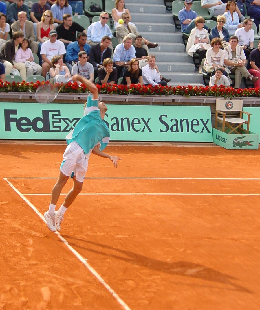 Gustavo Kuerten am 2. Juni 2003 bei Roland Garros gegen Tommy Robredo